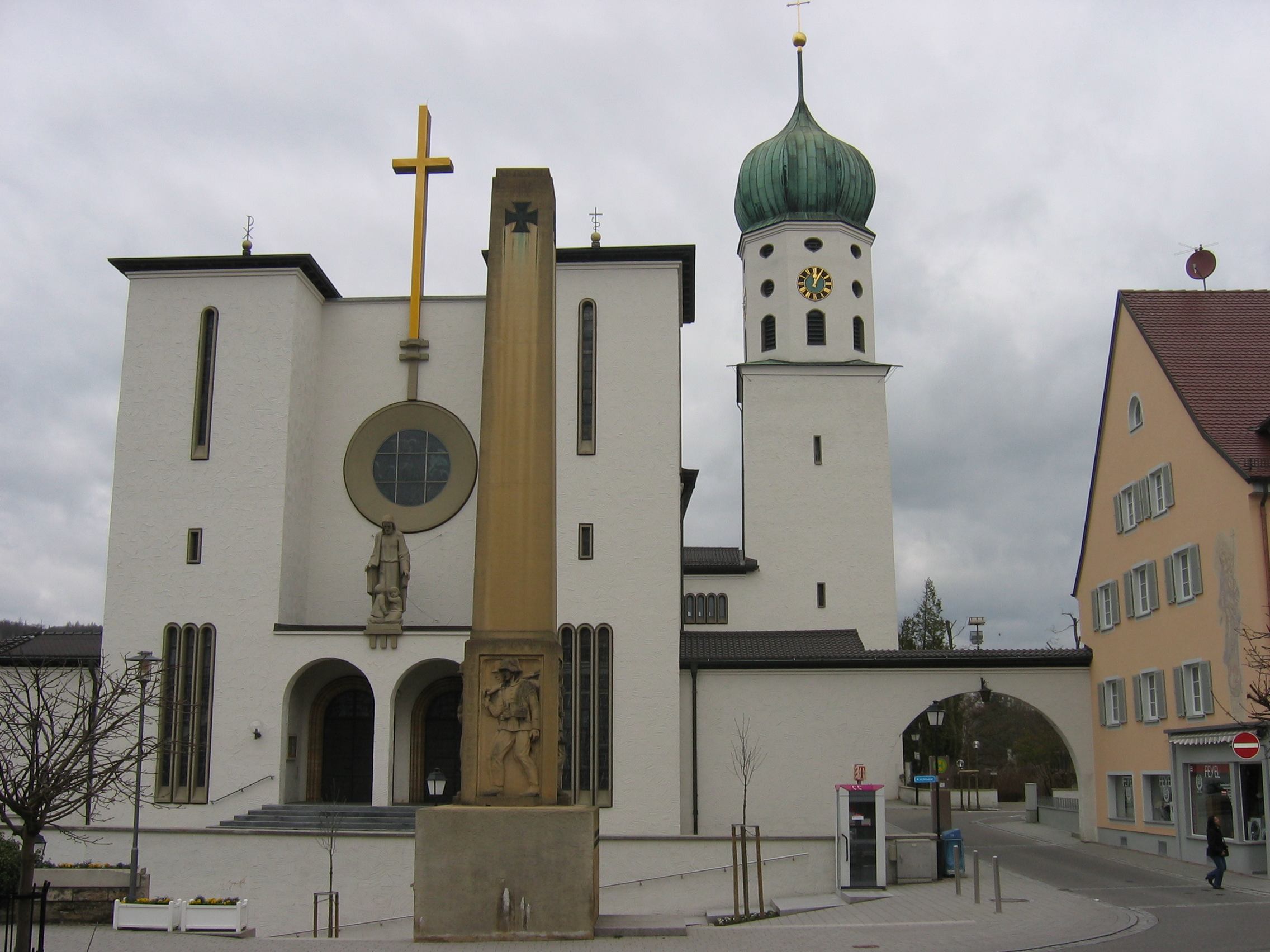 Kath. Pfarrkirche St. Oswald zu Stockach. Dosiero:Stockach